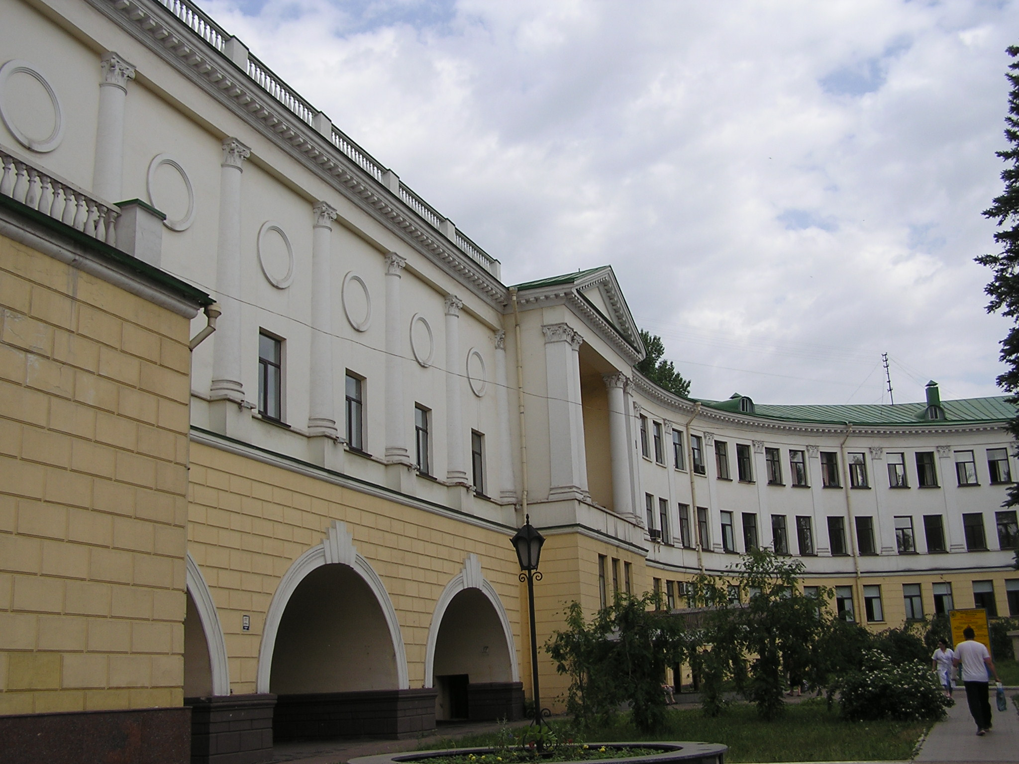 Донецк. Областная травматология